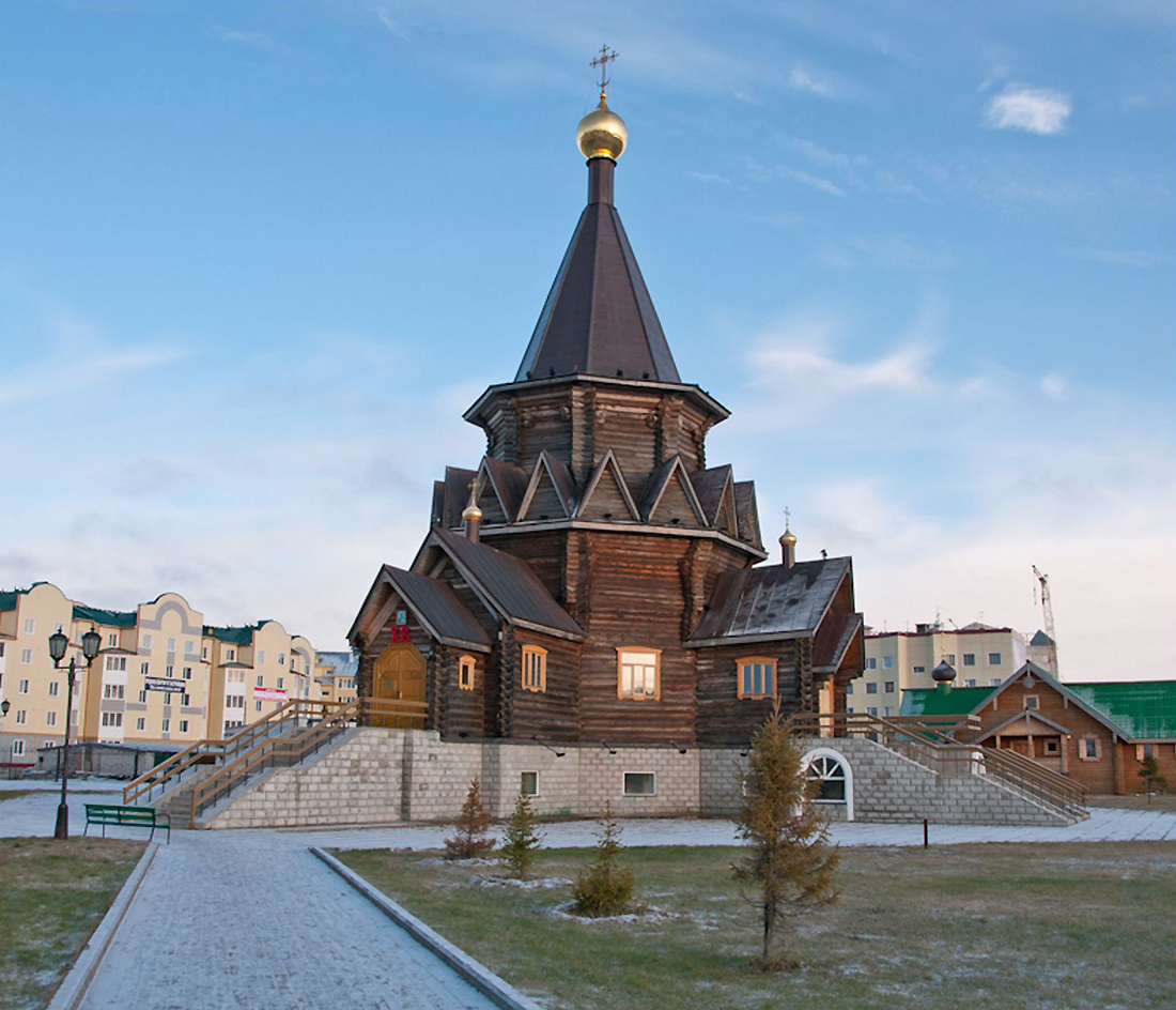 Богоявленский кафедральный собор в Нарьян-Маре